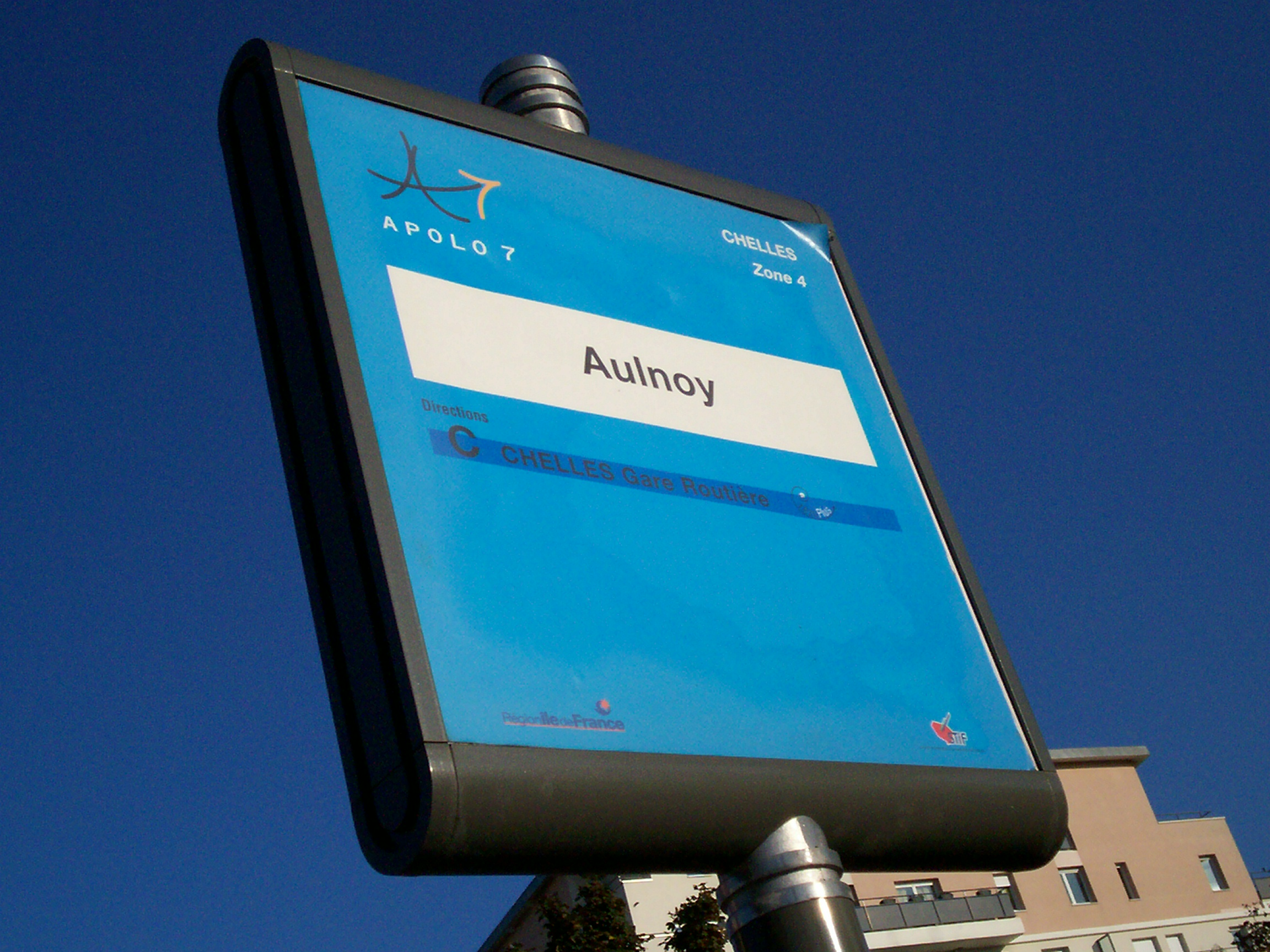 Panneau de l'arrêt : Aulnoy